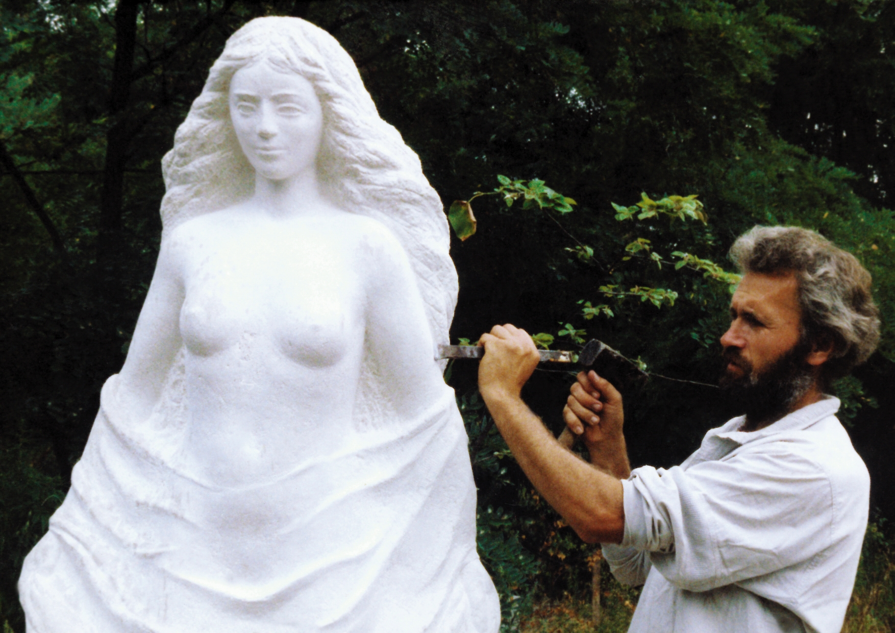 Kerekes Ferenc szobrászművész munka közben